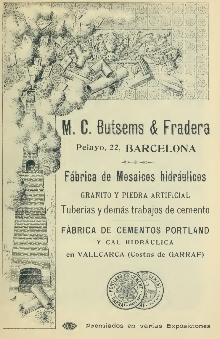 Anunci de la fàbrica de ciments i paviments Butsems & Fradera de 1907 (Catalunya)